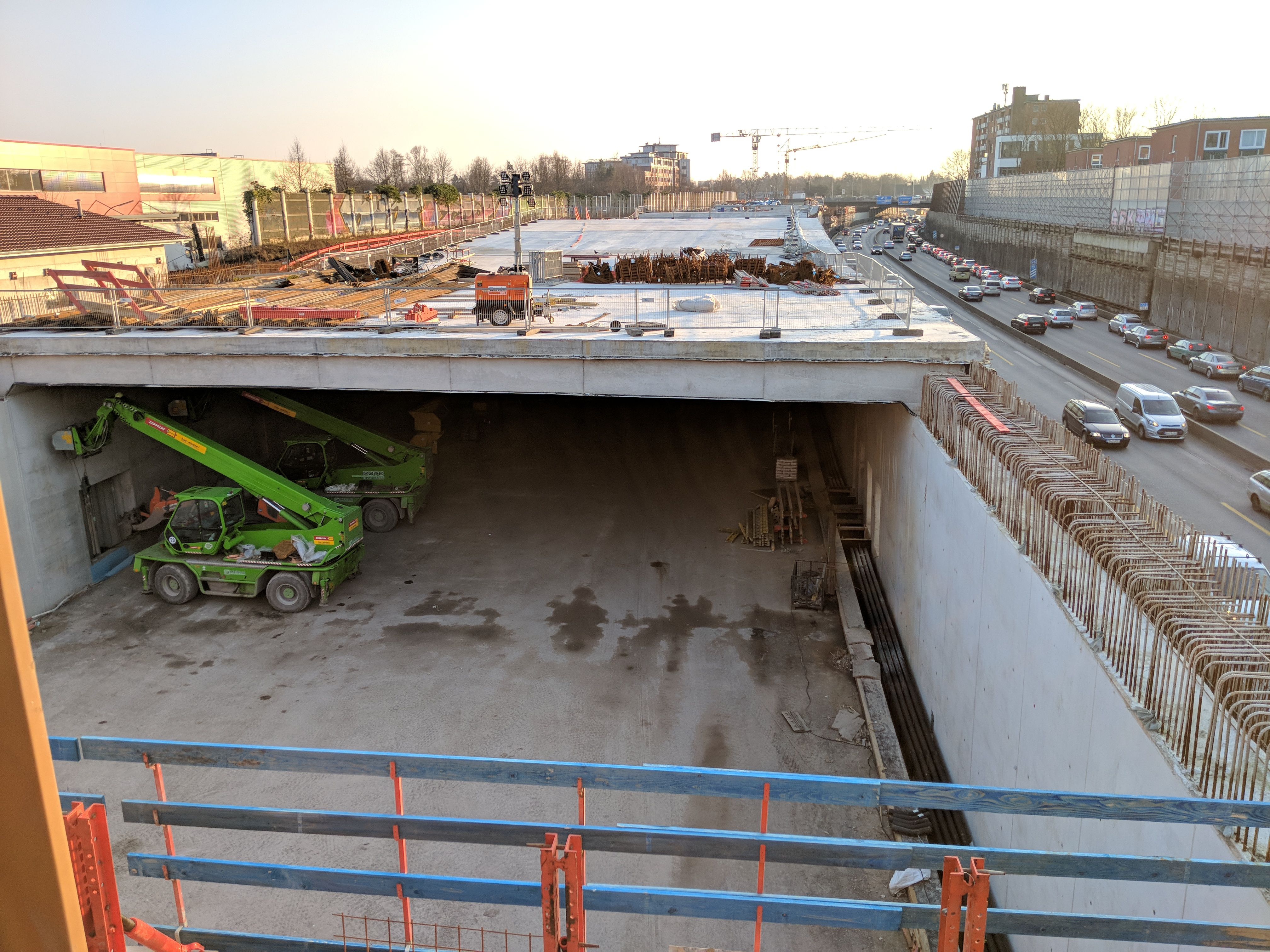 Hamburger Deckel - Stellingen - Brücke Wördemanns Weg Oströhre (Richtung Süden)